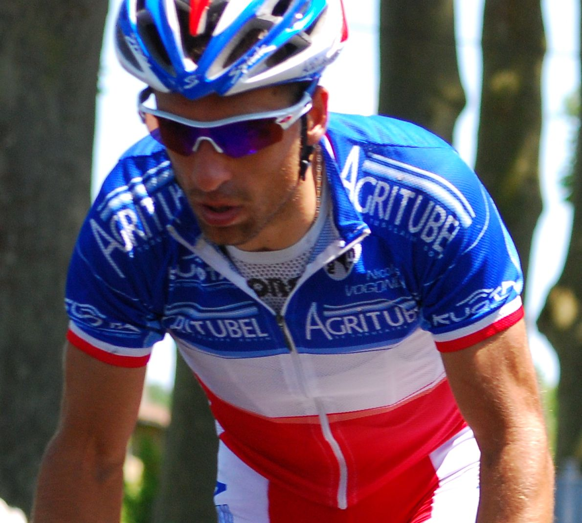 Tour de France 2008 - Etape Cholet Châteauroux Deux des échappés du jour - Nicolas Vogondy